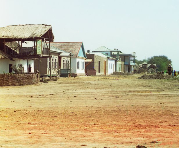 Sabirabad (Petropavlovka).